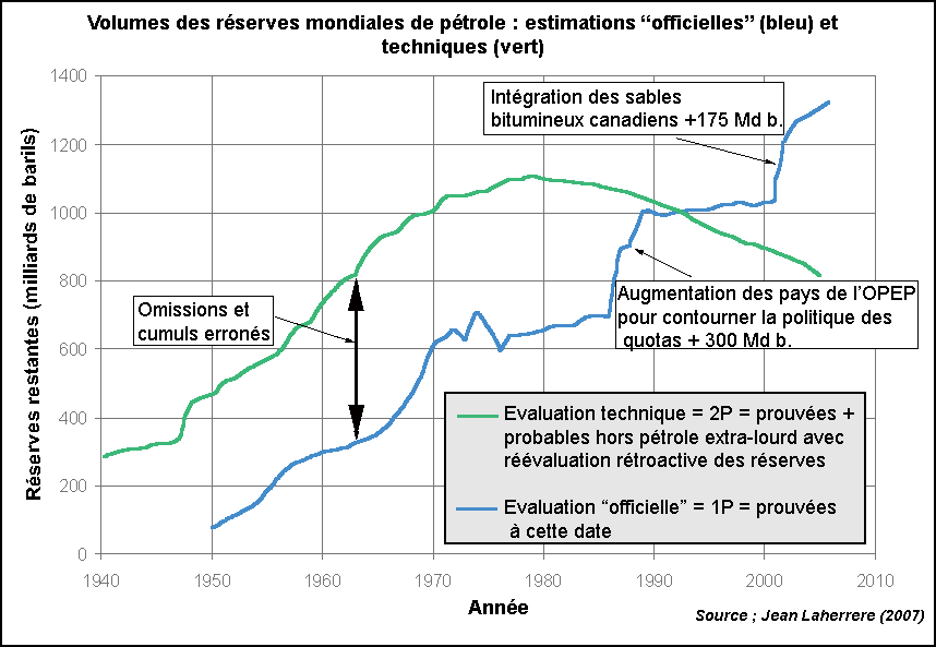 Historique des réserves de pétrole : déclaration officielle et évaluation technique selon Jean Laherrere (présentation de 2007)